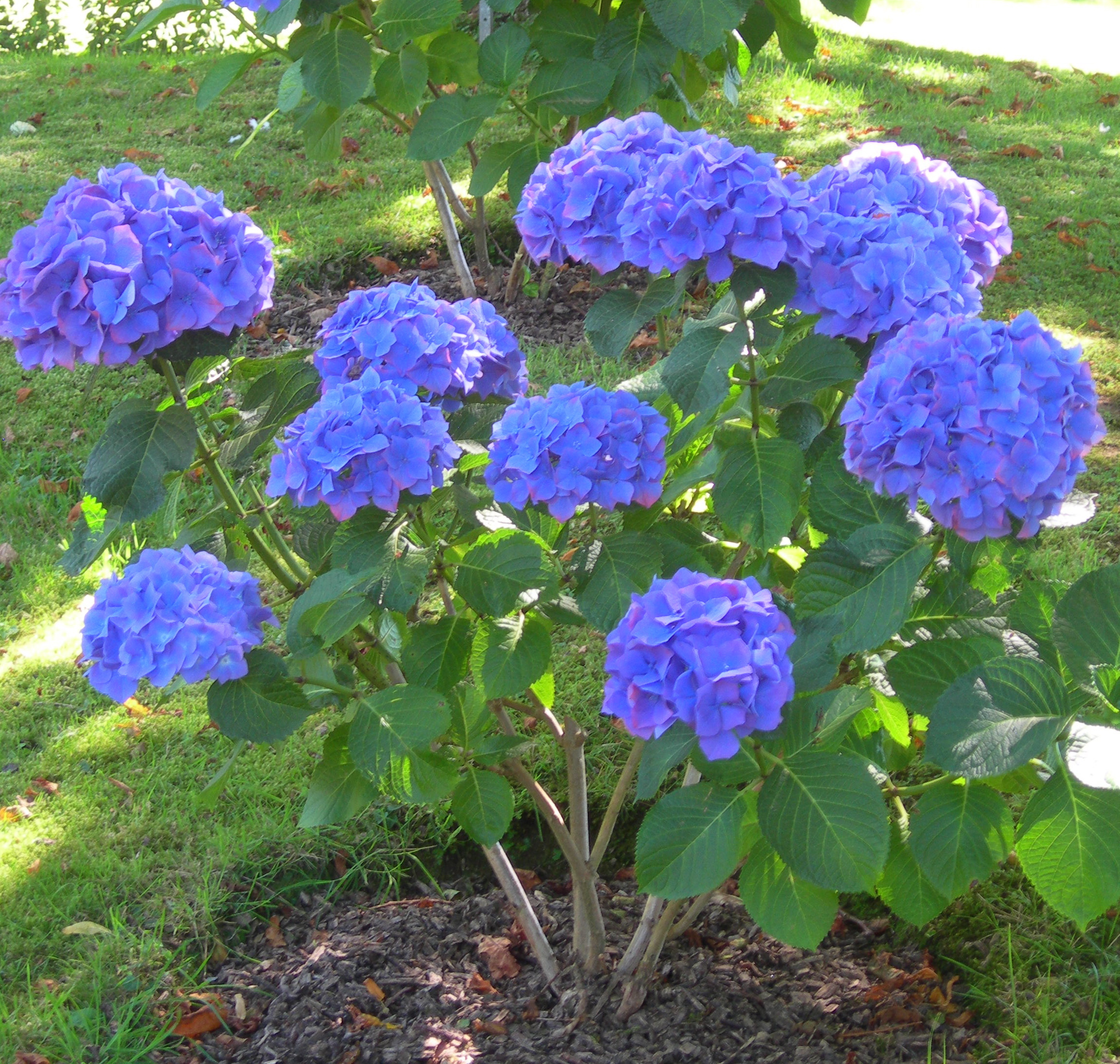 Hortensias sur Sark